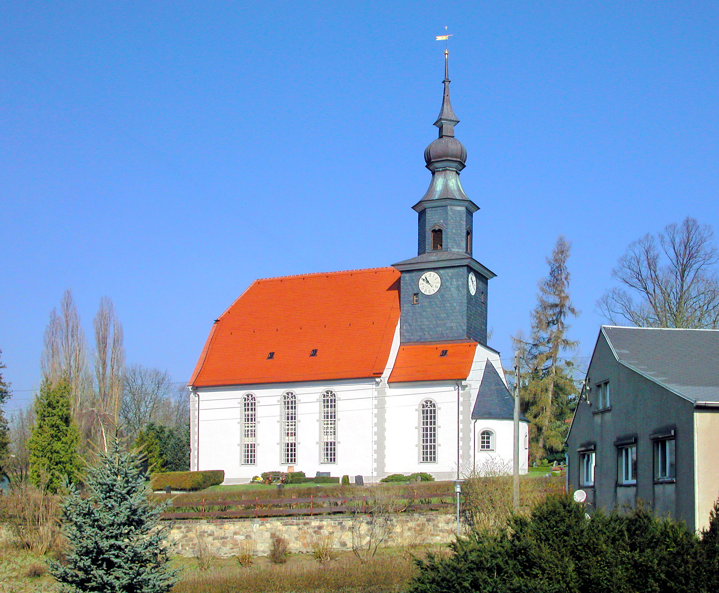 02.04.2009 04741 Gleisberg (zu Stadt Roßwein): Dorfkirche Gleisberg, Hauptstraße / Ecke Chorener Straße. Im Kern eine romanische Chorturmkirche aus der Zeit um 1200. Eines der ältesten Gotteshäuser des Döbelner Landes. Die ehemals kleinen Rundbogenfenster wurden erst 1828 zur heutigen Größe erweitert. Die Turmspitze stammt von 1784. [DSCN35860-35861.TIF]20090402020MDR.JPG(c)Blobelt